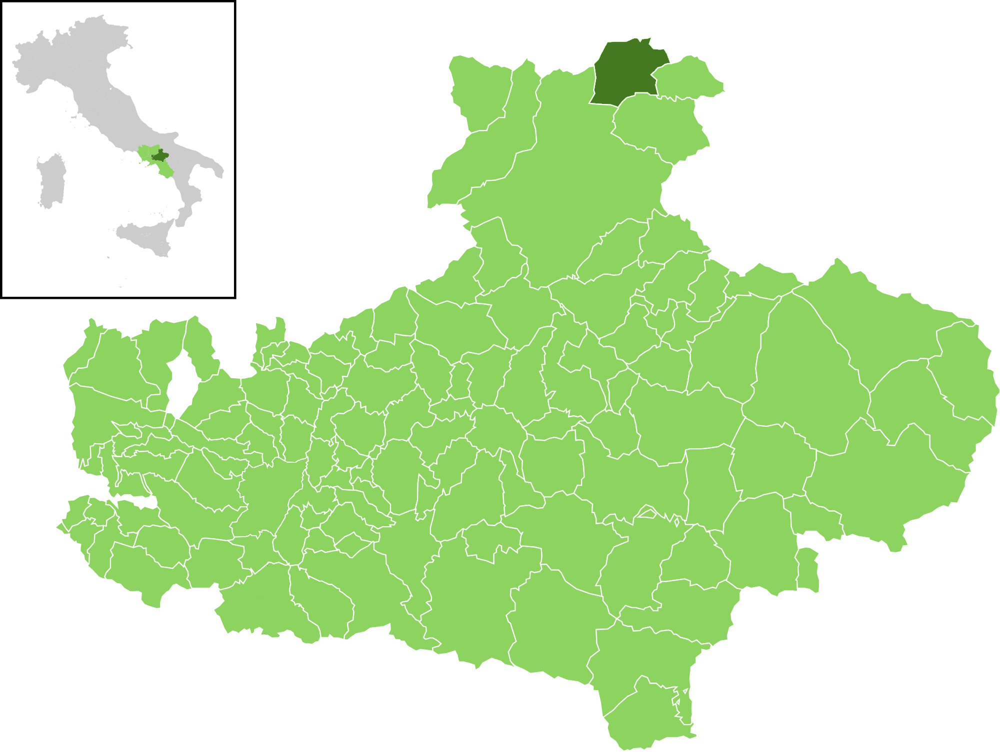 Il comune all'interno della provincia di Avellino